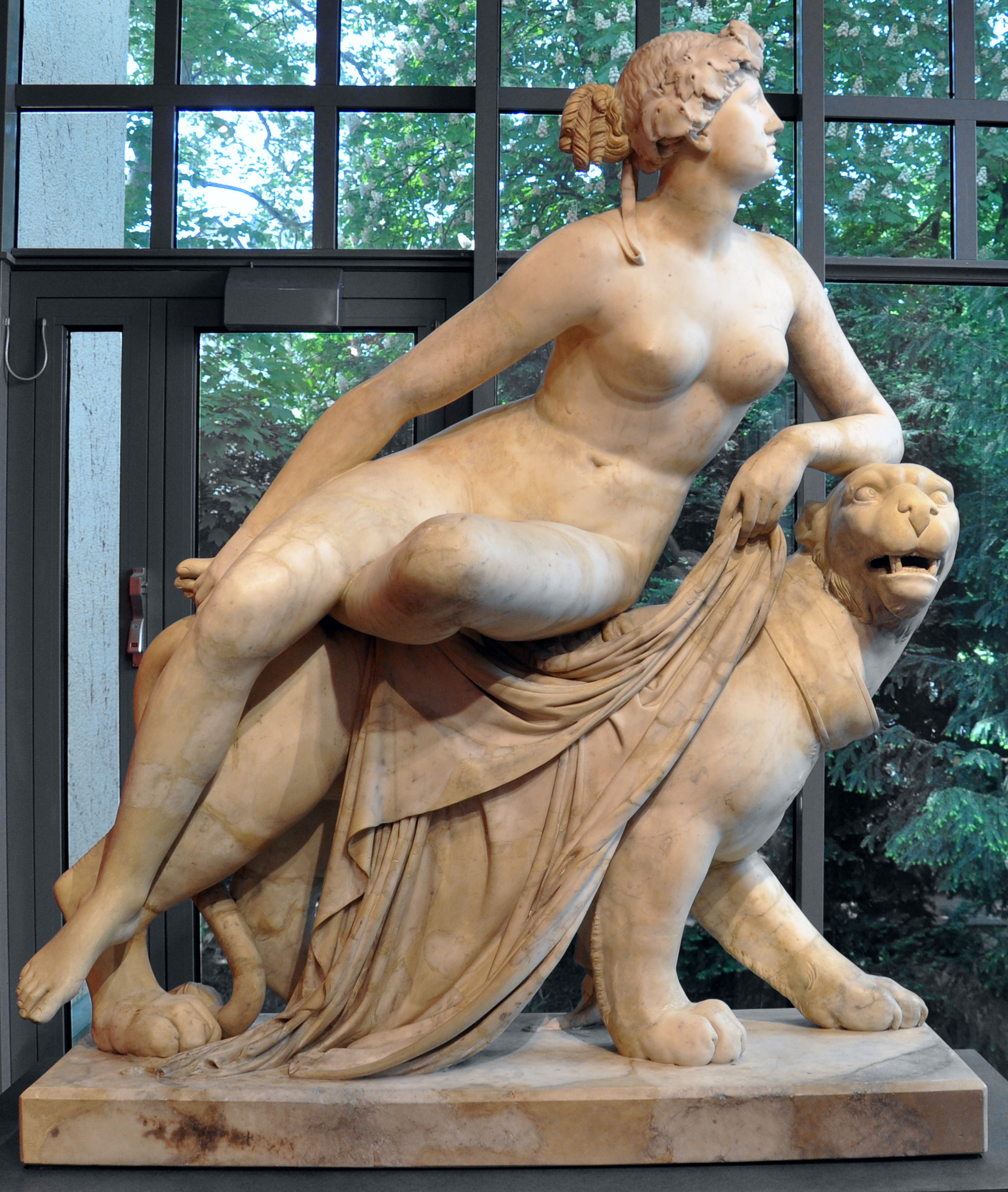 Johann Heinrich Dannecker: Ariadne auf dem Panther; Stuttgart 1803–1814; Marmor; Höhe 146 cm; Liebieghaus, Frankfurt am Main, Inv. Nr. 1569.